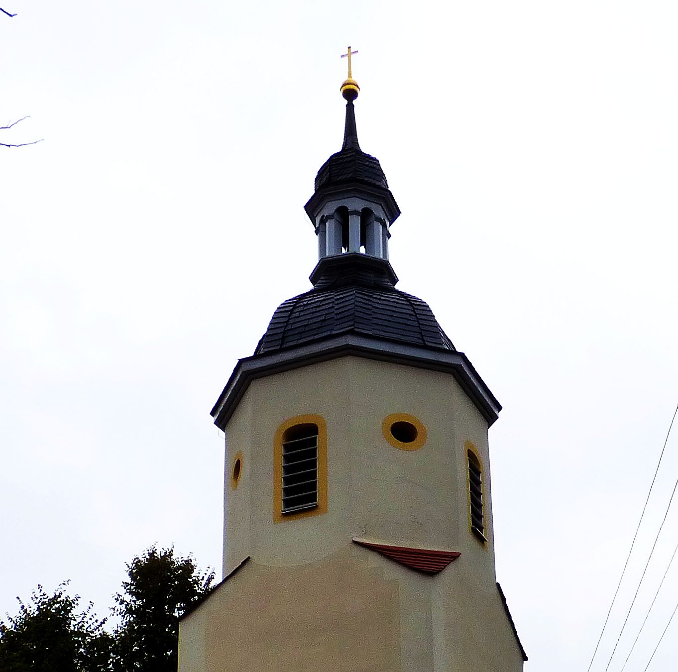 Kirchturm der Dorfkirche in Prösen